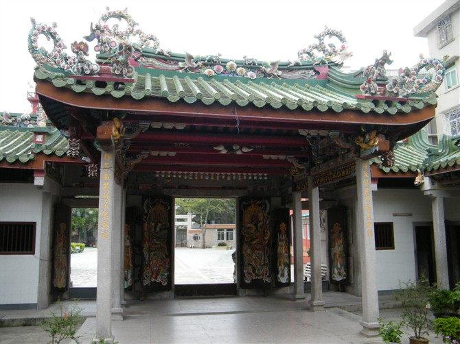 达濠巡司埠双忠古庙内